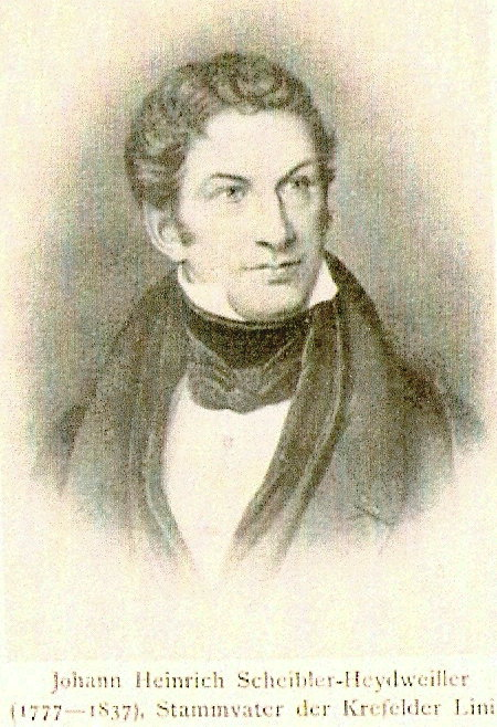 Scan eines Porträts aus dem Scheibler'schen Familienbesitz